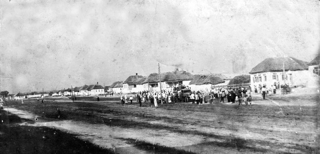 Ростовская область. Село Маньково, ул. Кирова. 1937г. .